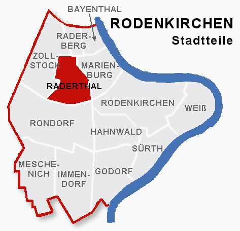 Lage des Stadtteils Raderthal im Stadtbezik Rodenkirchen